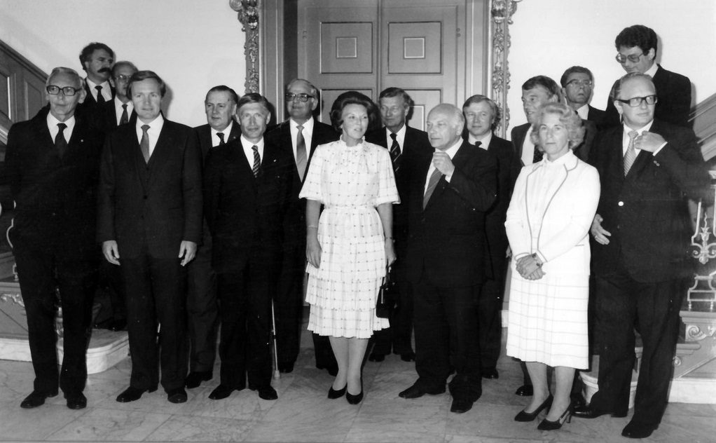 Kabinet-Van Agt II